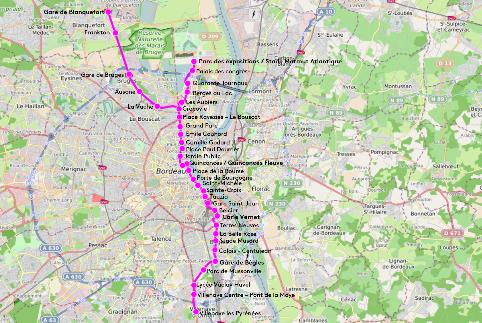 Plan de l'actuelle ligne C du tramway de Bordeaux